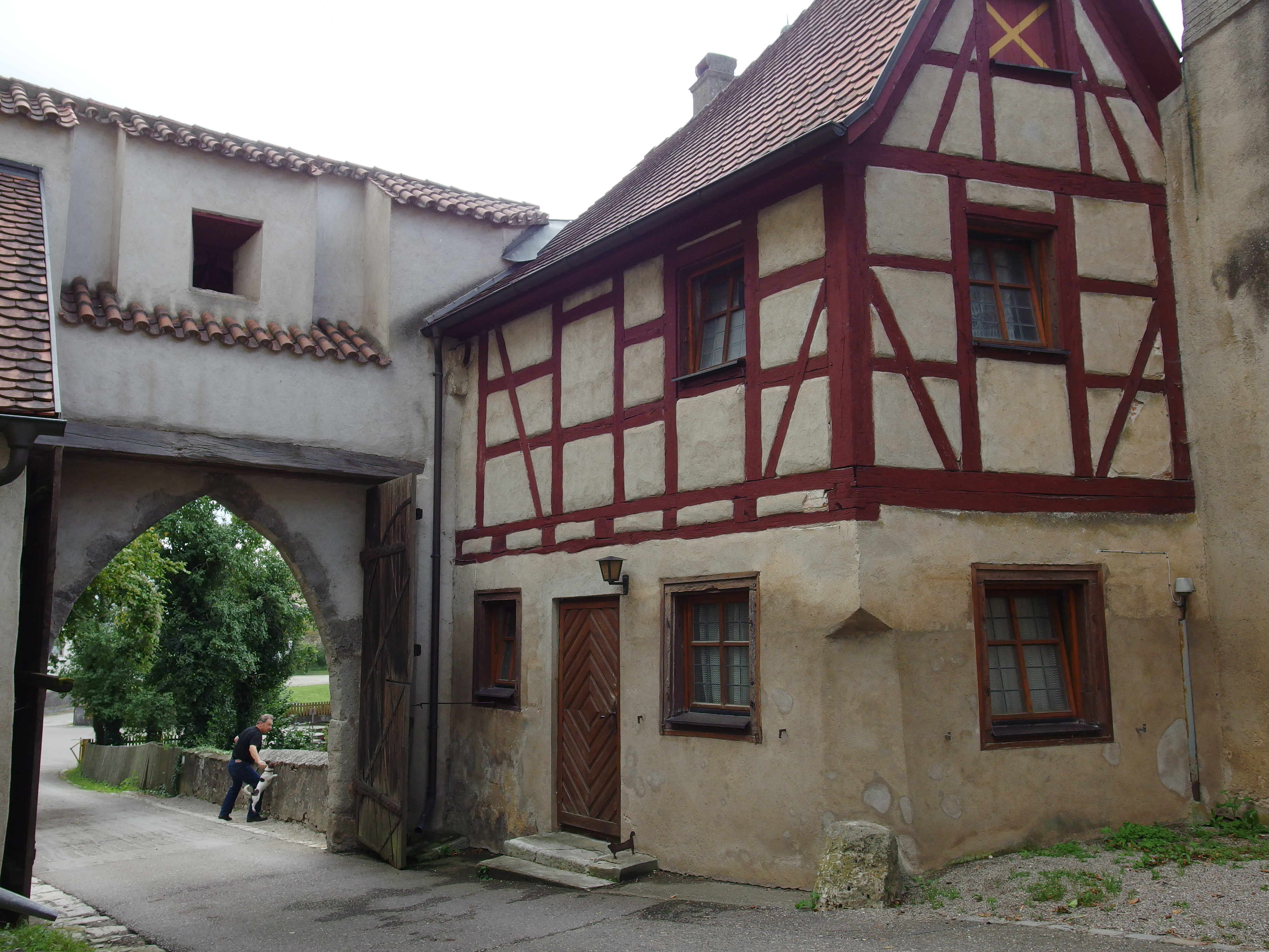 Harburg, Schloß Harburg; Unteres Tor, WacheThis is a photograph of an architectural monument.